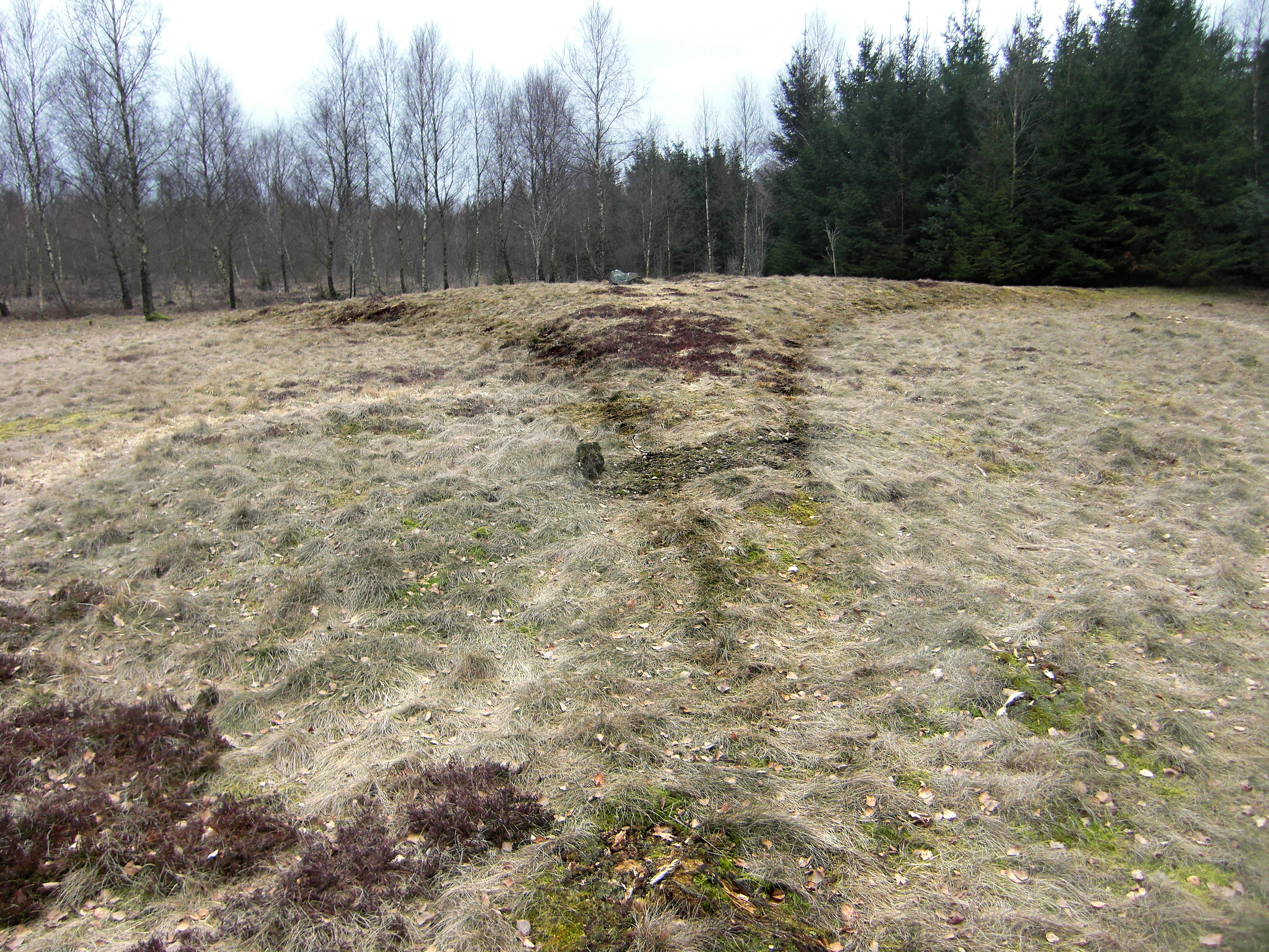 Den ena av två stora treuddar (RAÄ-nr Asige 68:2) i Asige socken, Årstads härad, Falkenbergs kommun, Halland, Hallands län, Sverige. Båda treuddarna har 33 meter långa sidor och är bland de största i Sverige. Treuddarna dateras troligen till folkvandringstid.